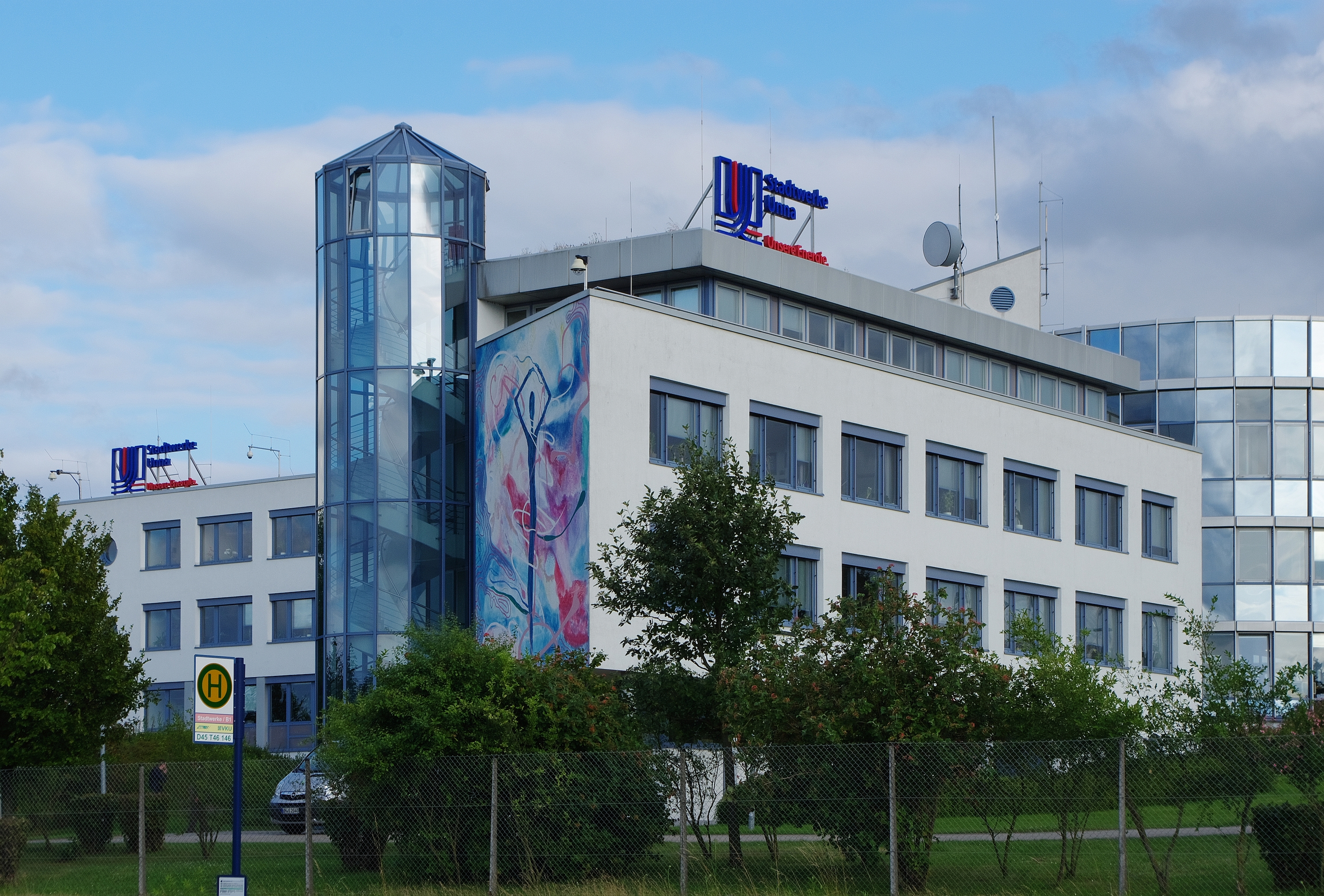 Neubau der Stadtwerke Unna